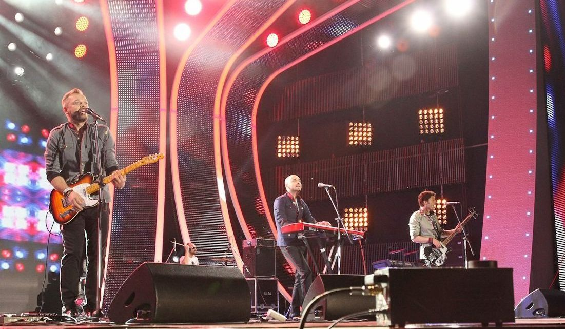 Гурт Авіатор